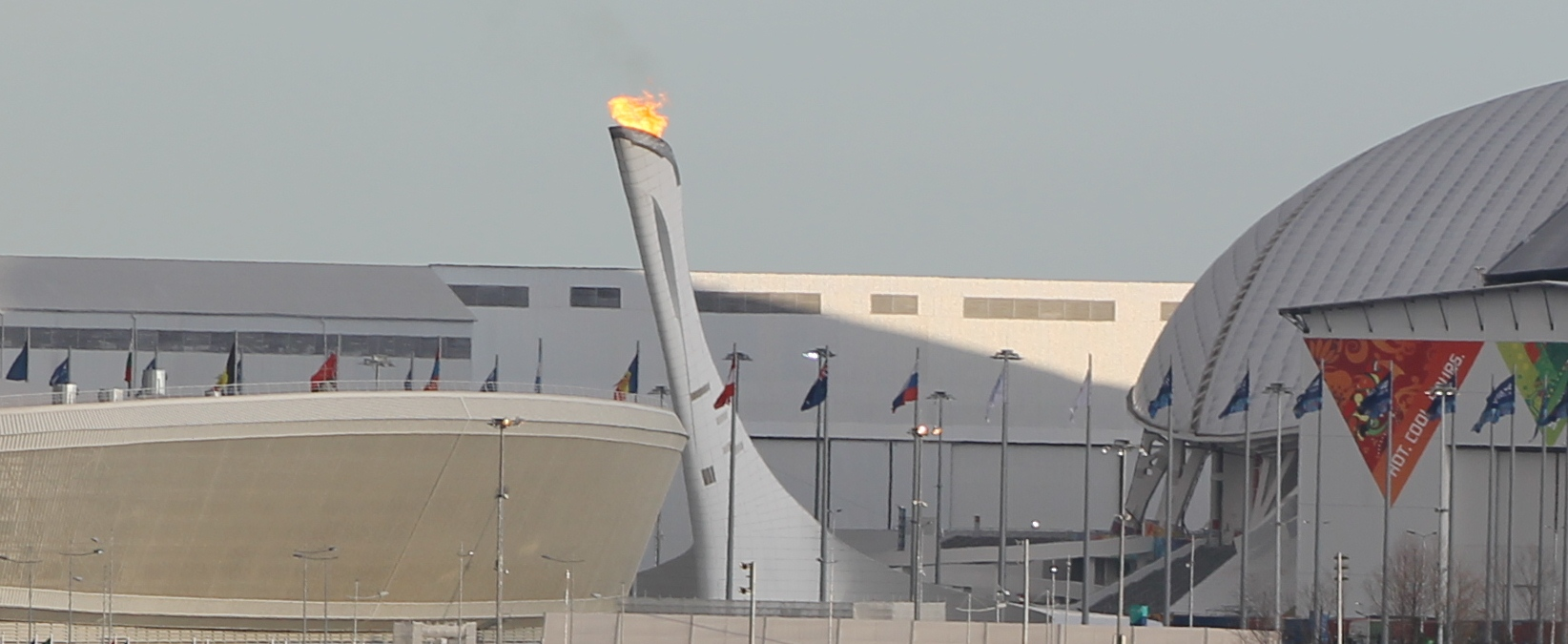 Чаша олимпийского огня во время зимней олимпиады 2014 в Сочи